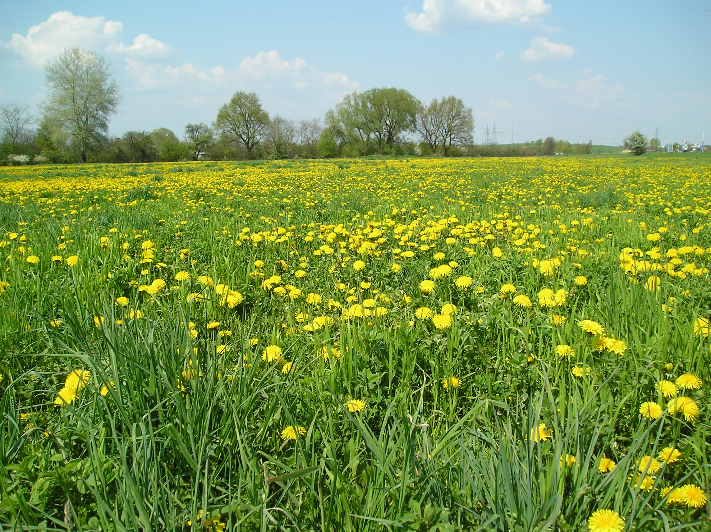 Mniszek lekarski na łące